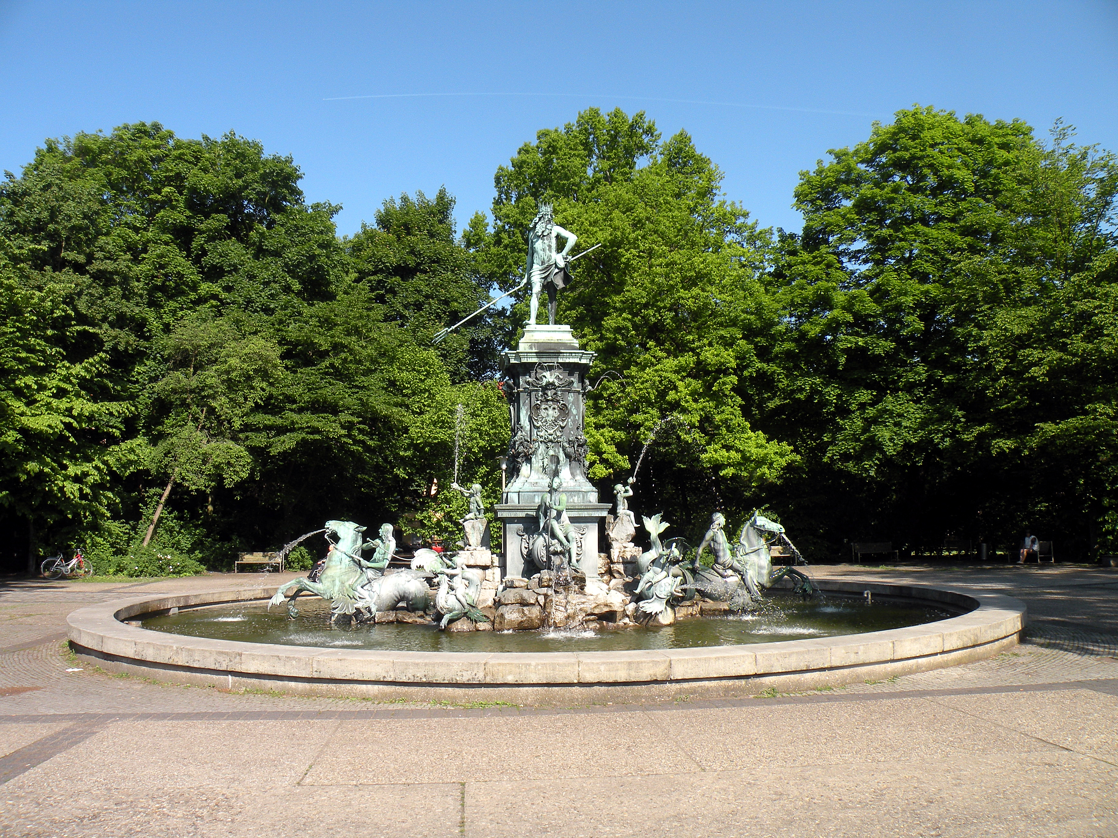 Нюрнберг.Фонтан Нептун.